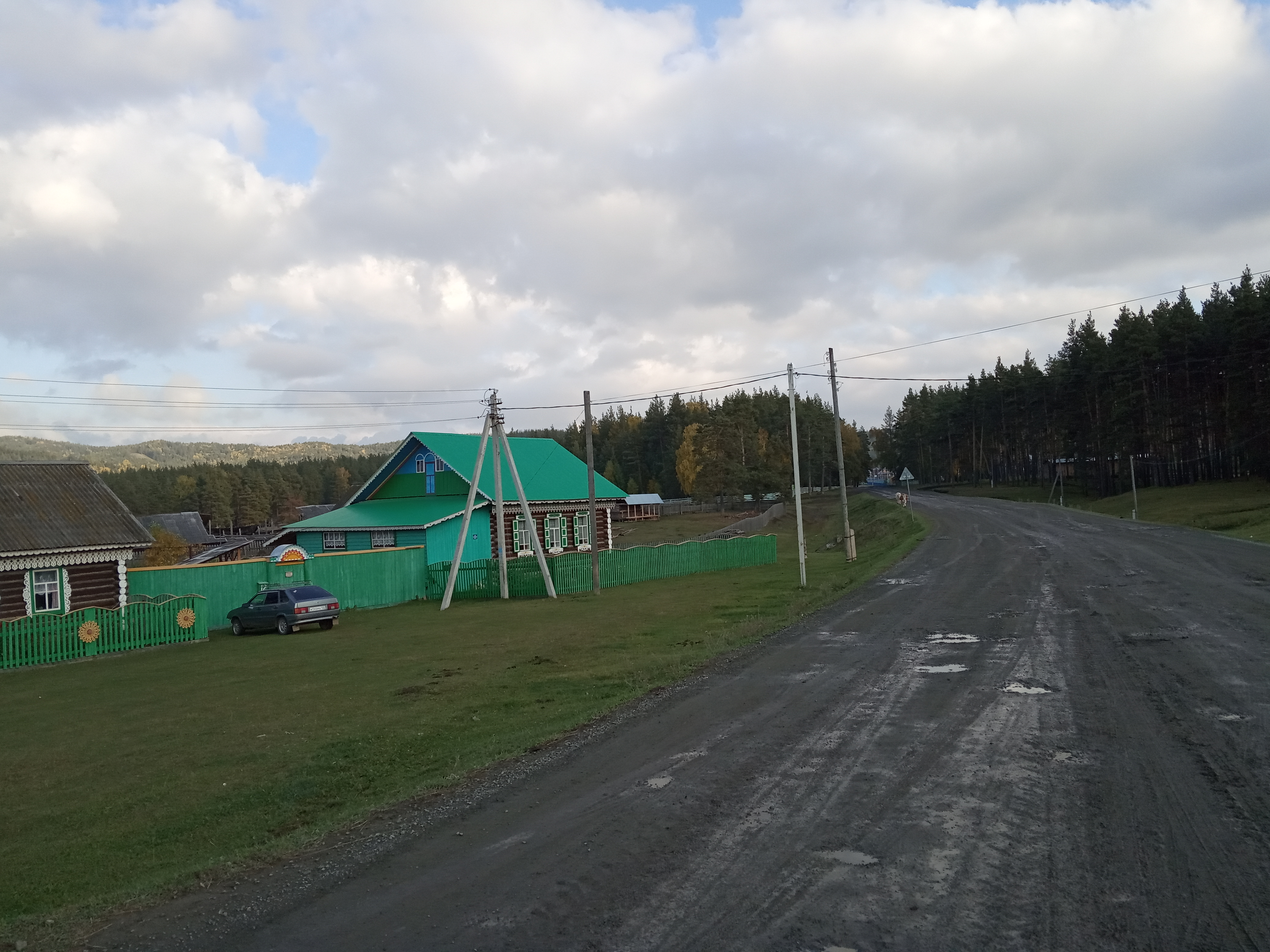 Бурзянский район, дер.Яумбаево